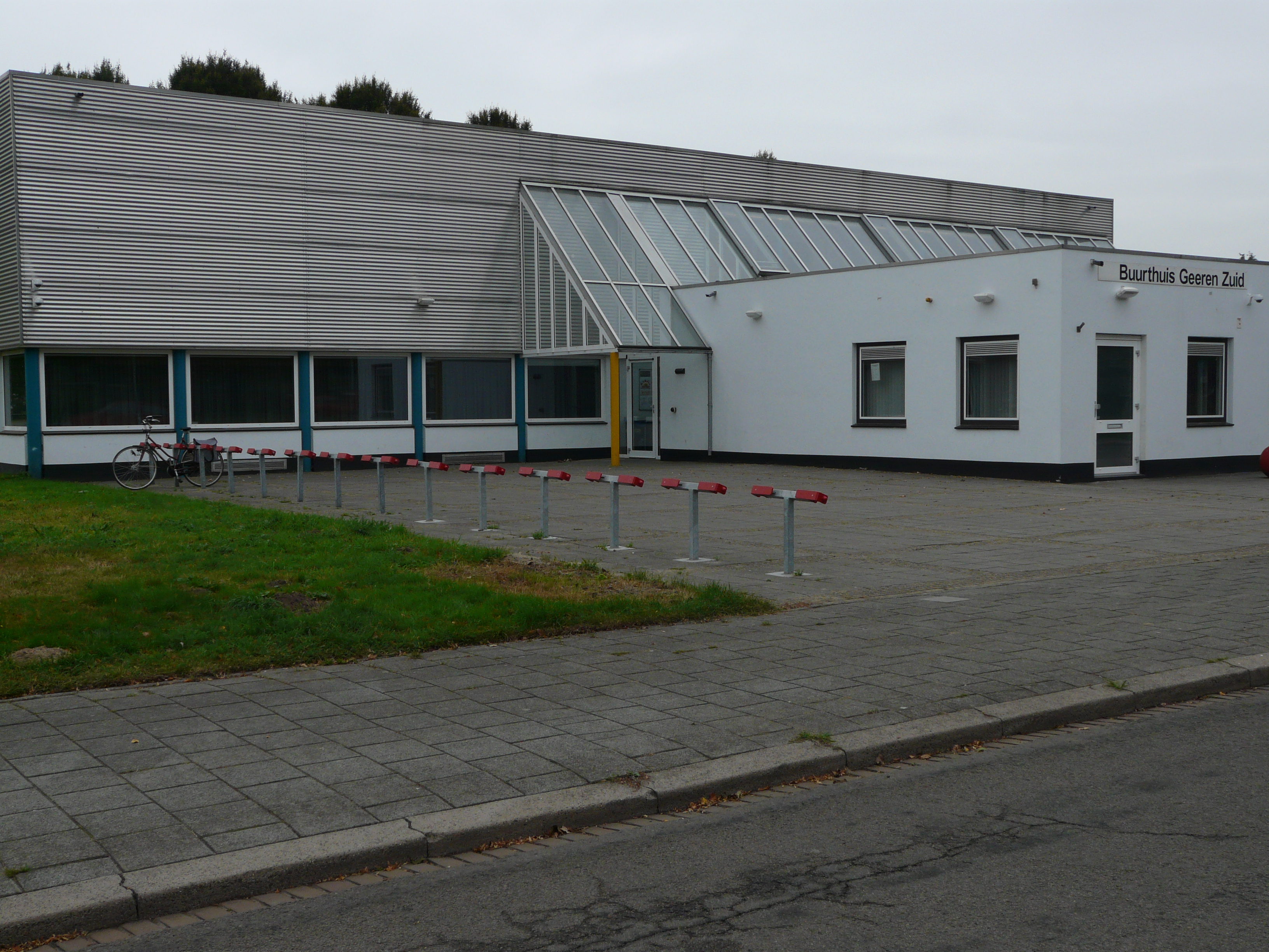 Buurthuis Geeren Zuid in de wijk de Geeren dichtbij de Hoge Vucht in het noorden van Breda